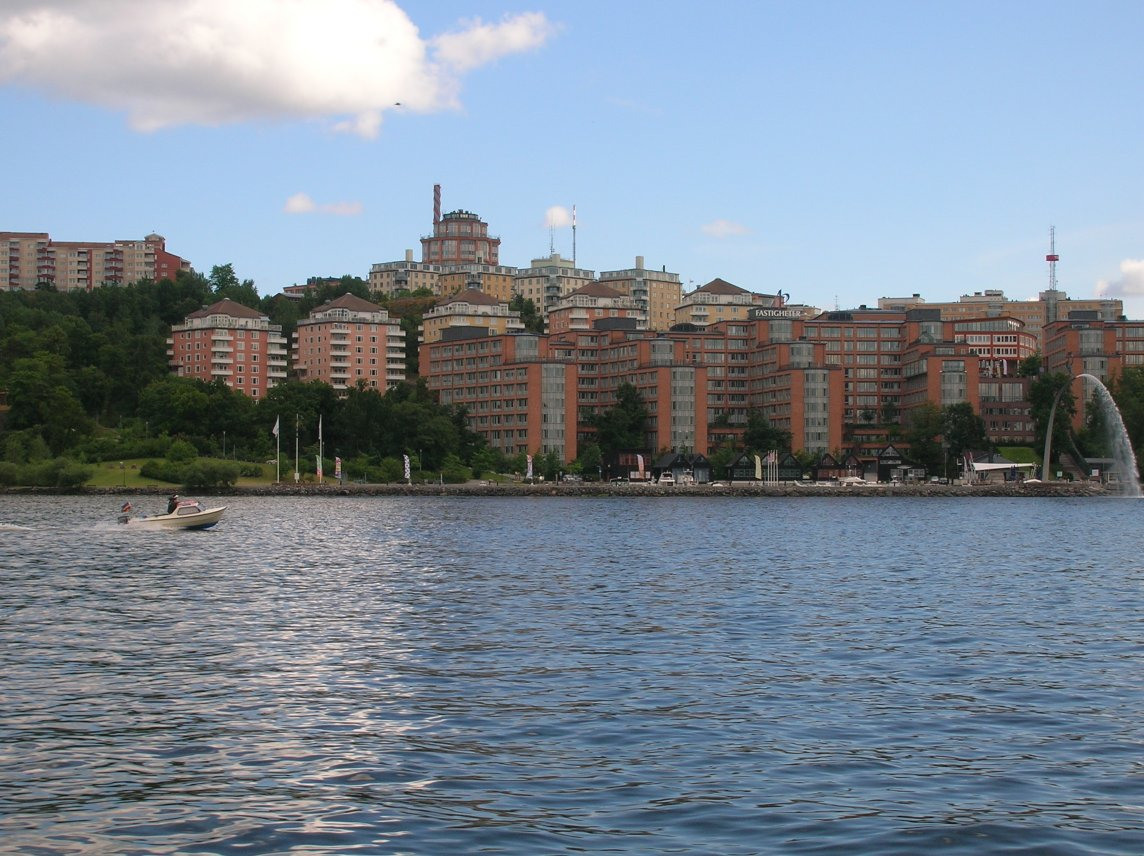 Nacka strand, Nacka, Sweden.